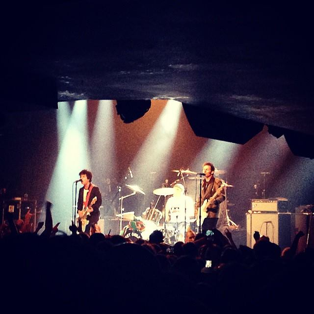 Live Sweet Children